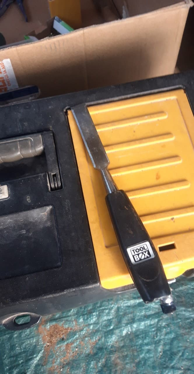 Puumeisel